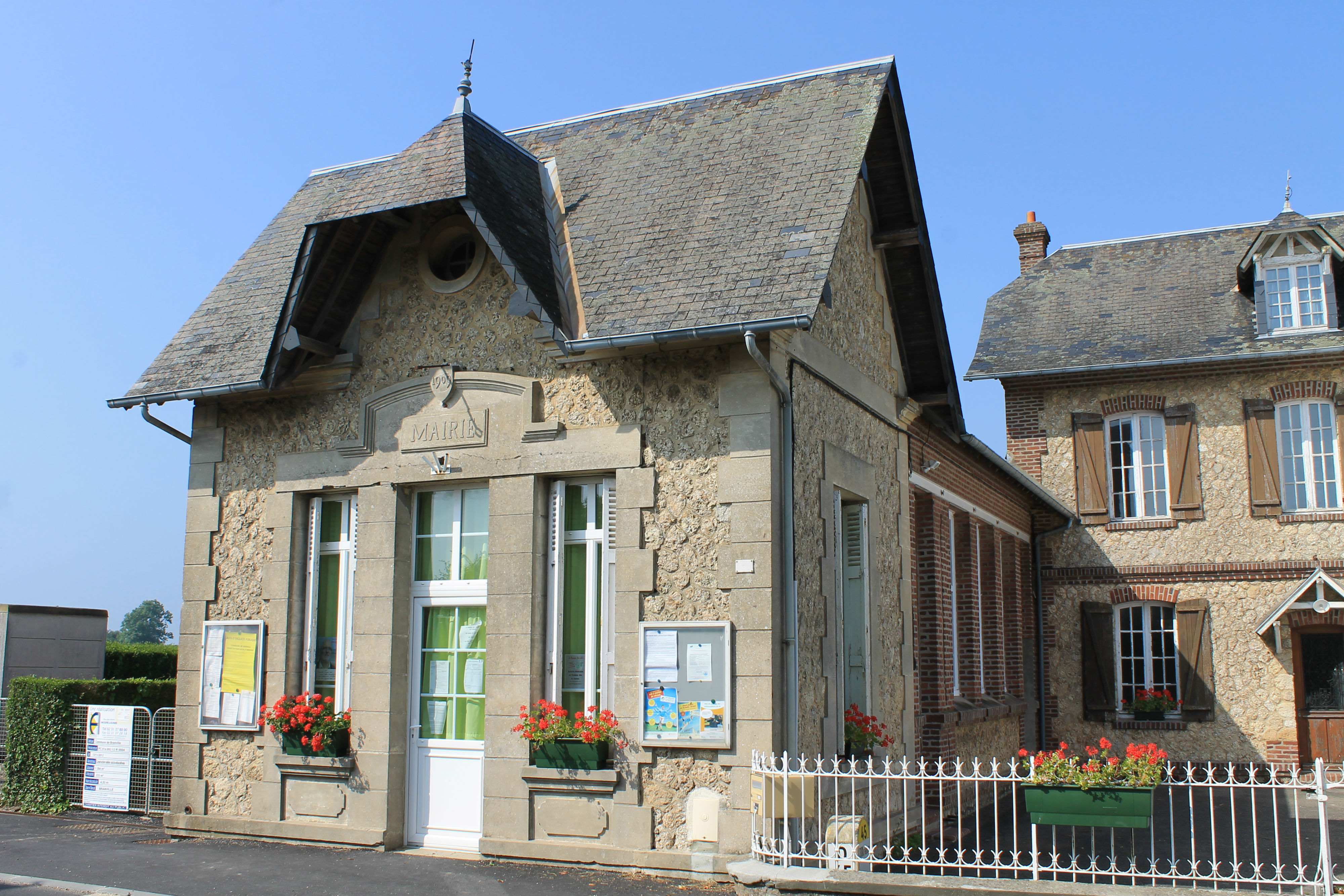 Mairie et ancienne école de Branville (Calvados)